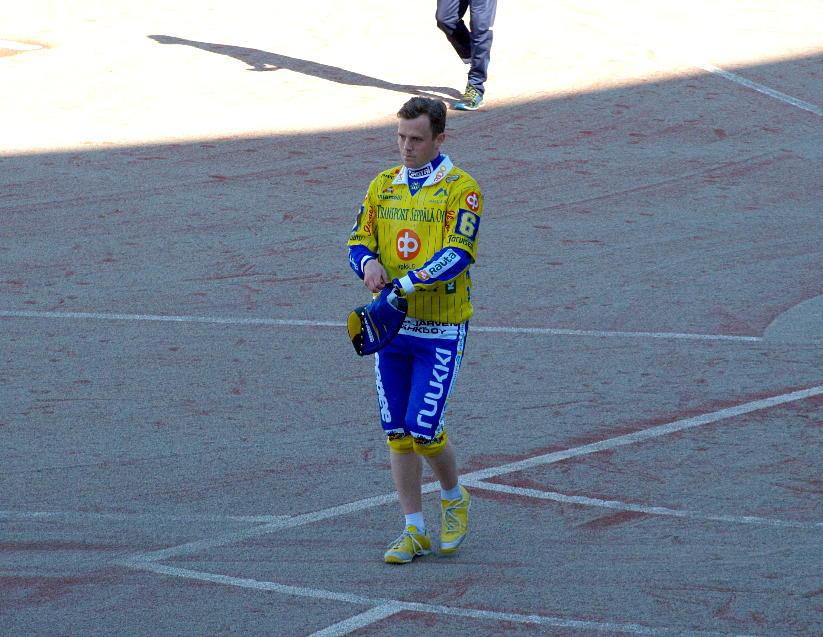 Alajärven Ankkurit - Vimpelin Veto pesäpallo-ottelu 23.6.2015. Kuvassa Janne Kivipelto.